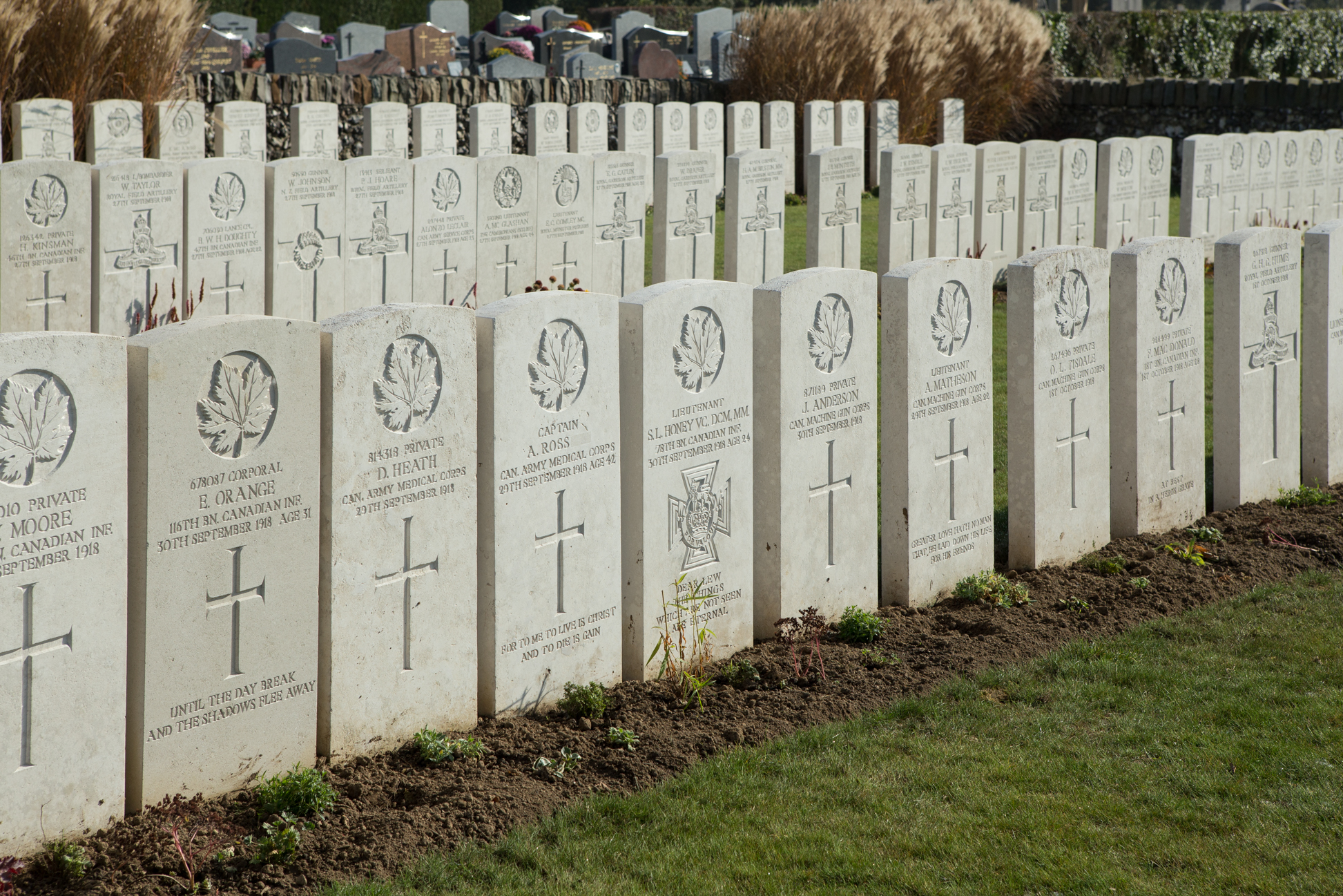 Queant Communal Cemetery British Extension